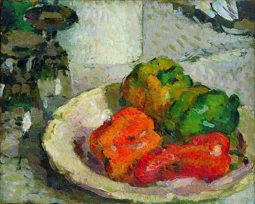 Stillleben mit Paprika, Paris um 1907, Öl auf Leinwand, 32,6 x 40,6 cm, Besitzer: Stadt Speyer